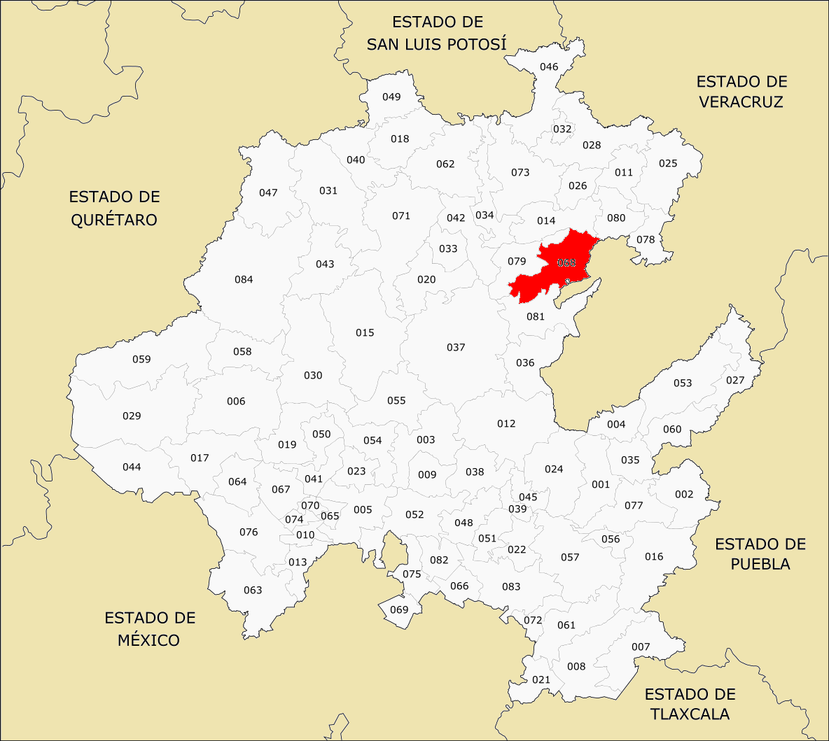 Municipios de Hidalgo